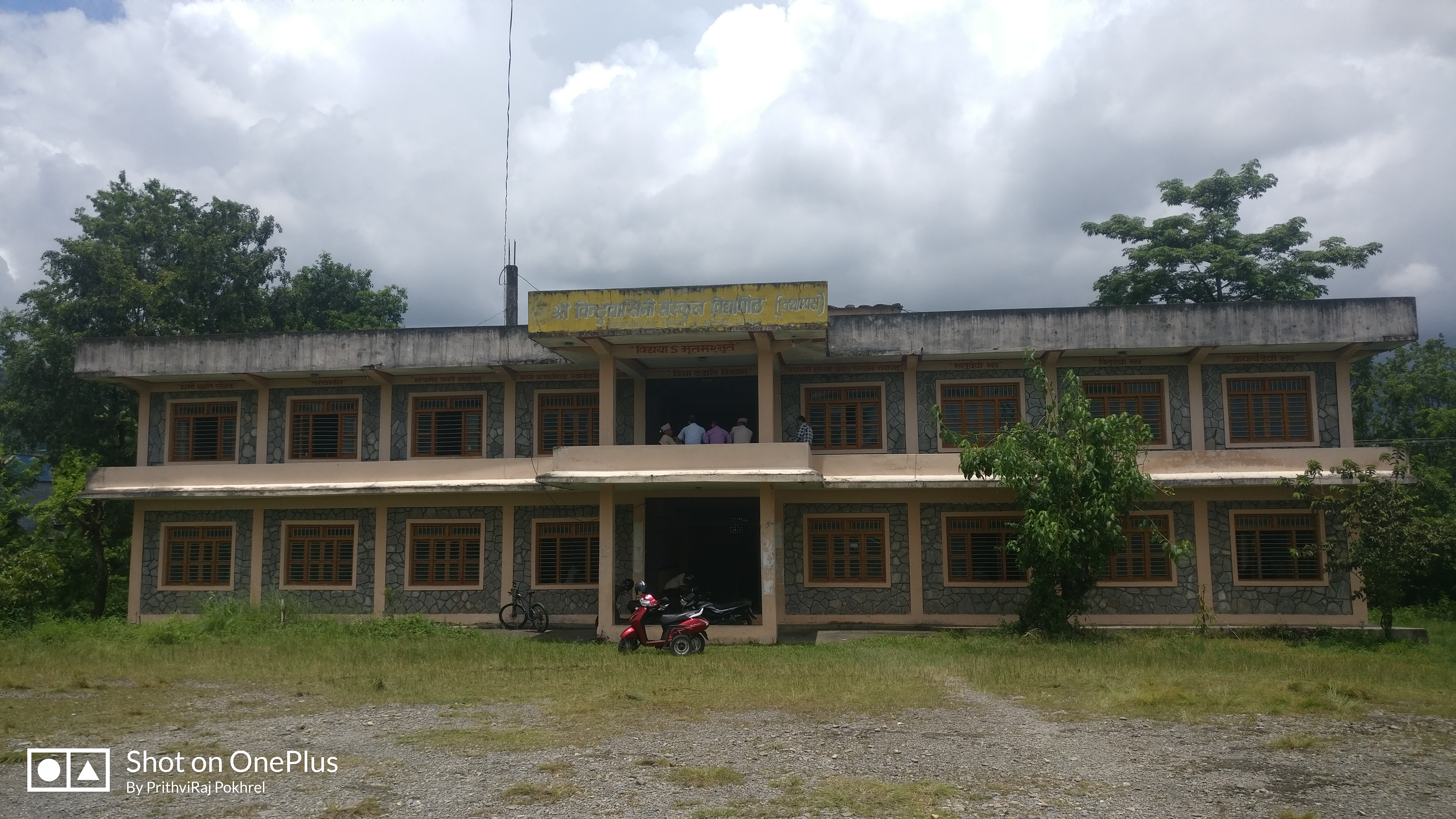 नेपाली: विद्यापीठ को मुख्य प्रशाशनिक भवन तथा कक्षाकोठा